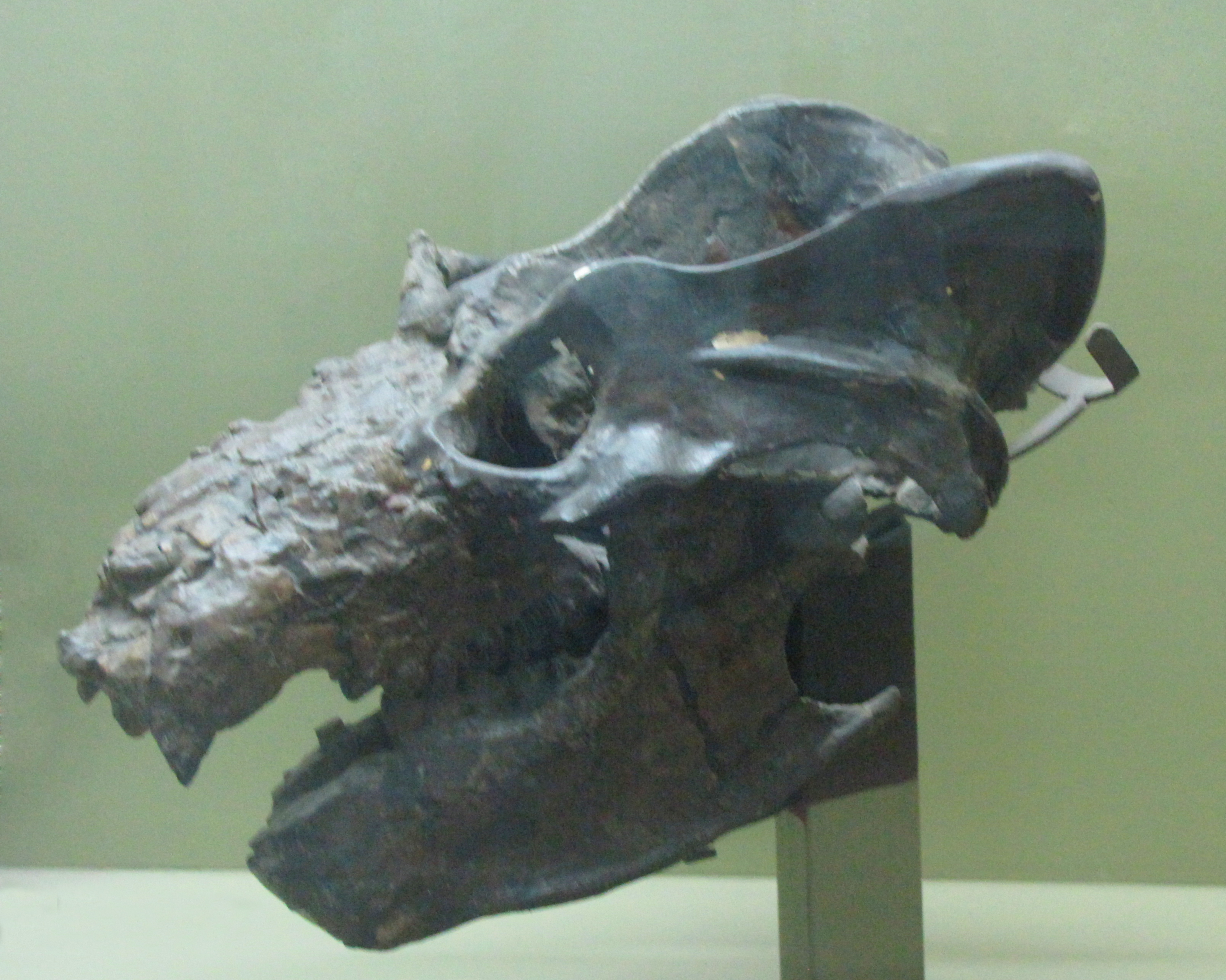 Exaeretodon. Cráneo y Mandíbula. Museo de Ciencias Naturales de La Plata.